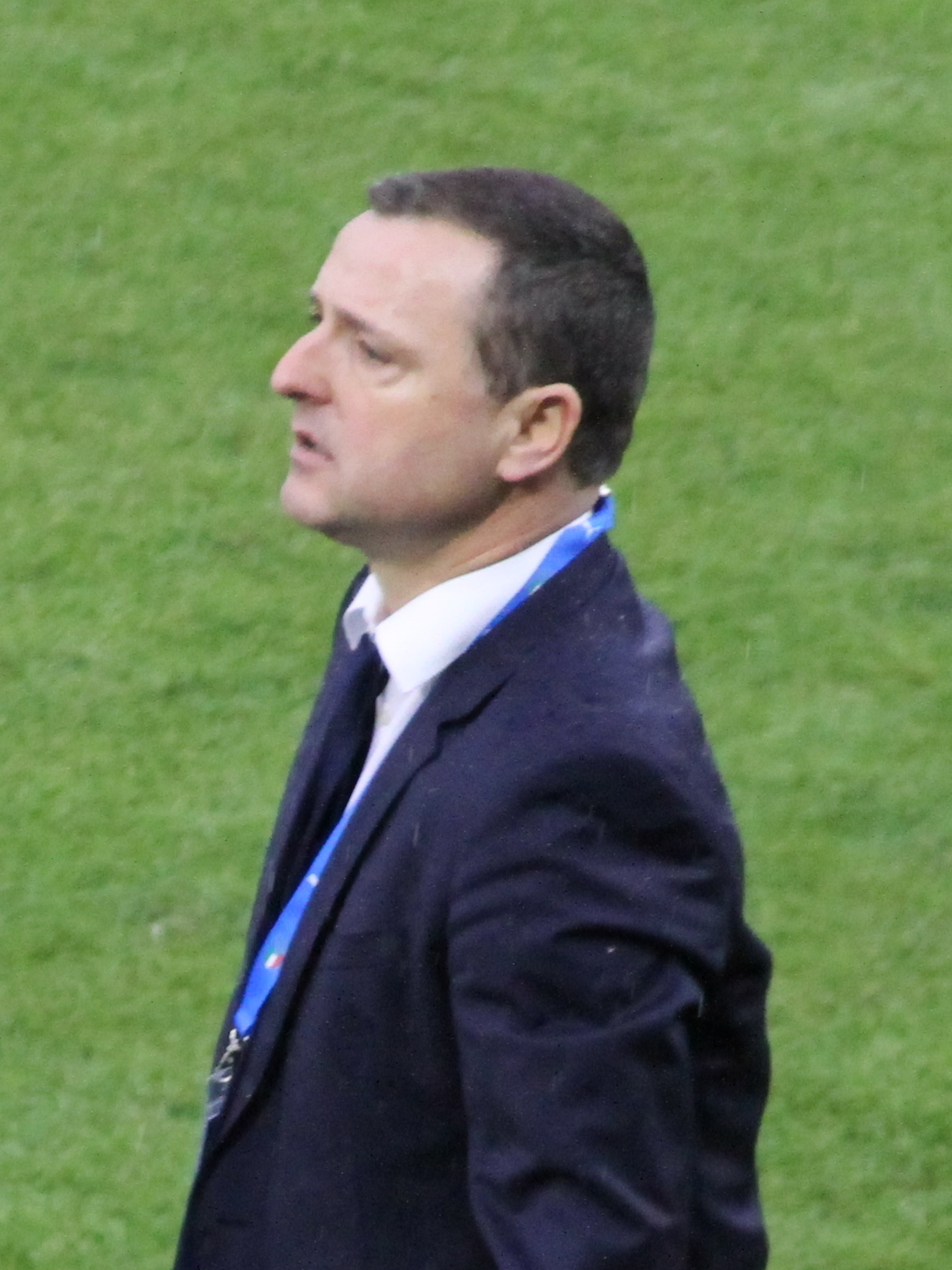 Ives Serneels, selezionatore della nazionale di calcio femminile del Belgio, mentre segue da bordo campo durante l'incontro Italia-Belgio del 10 aprile 2018 allo stadio Mazza di Ferrara.